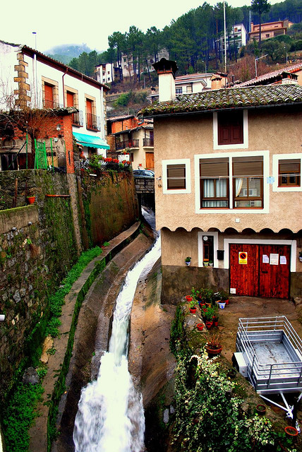 Guisando, Castile and León, Spain.